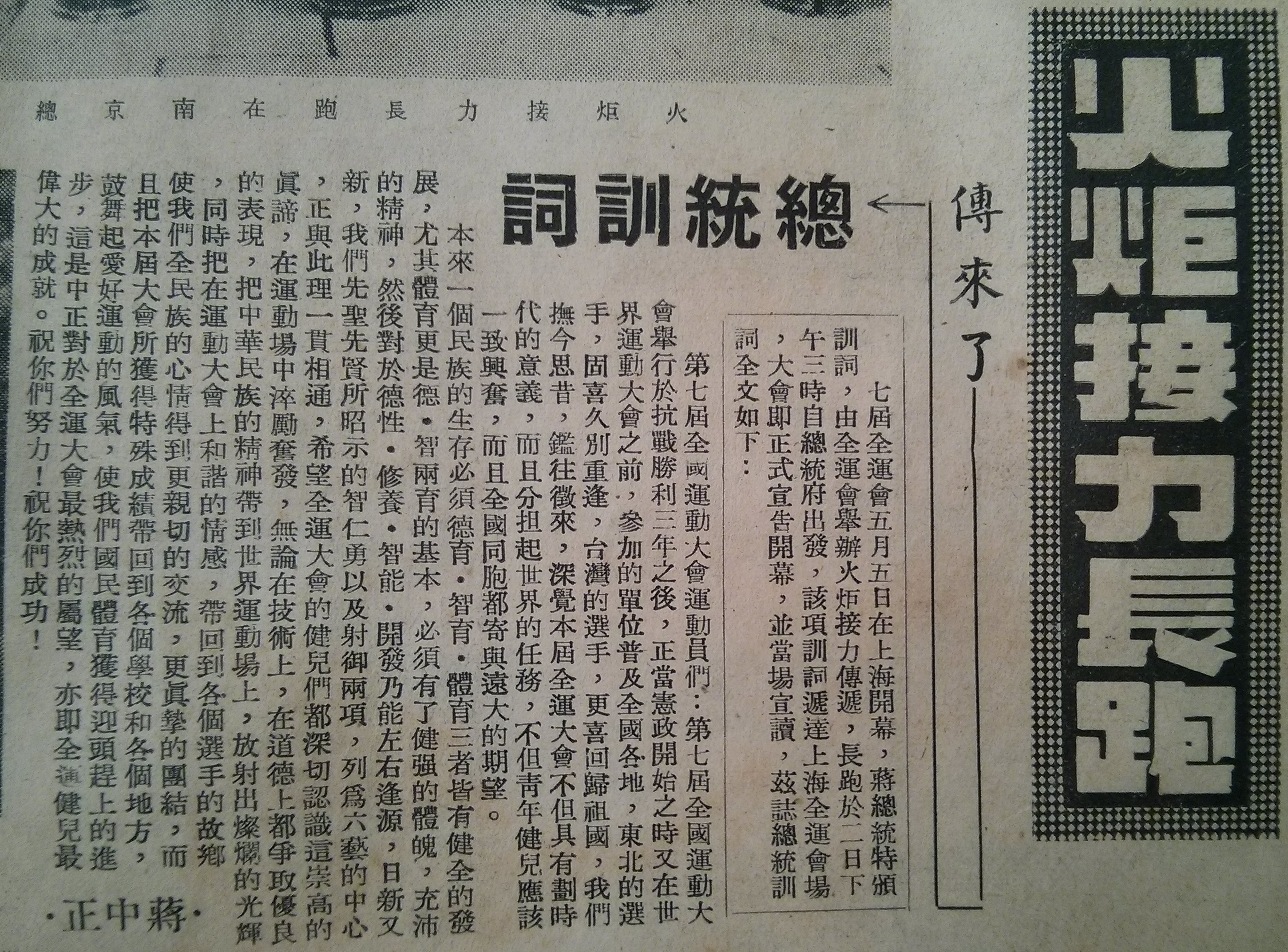 總統訓詞，載於1948年申報館出版的《第七屆全國運動會畫刊》。